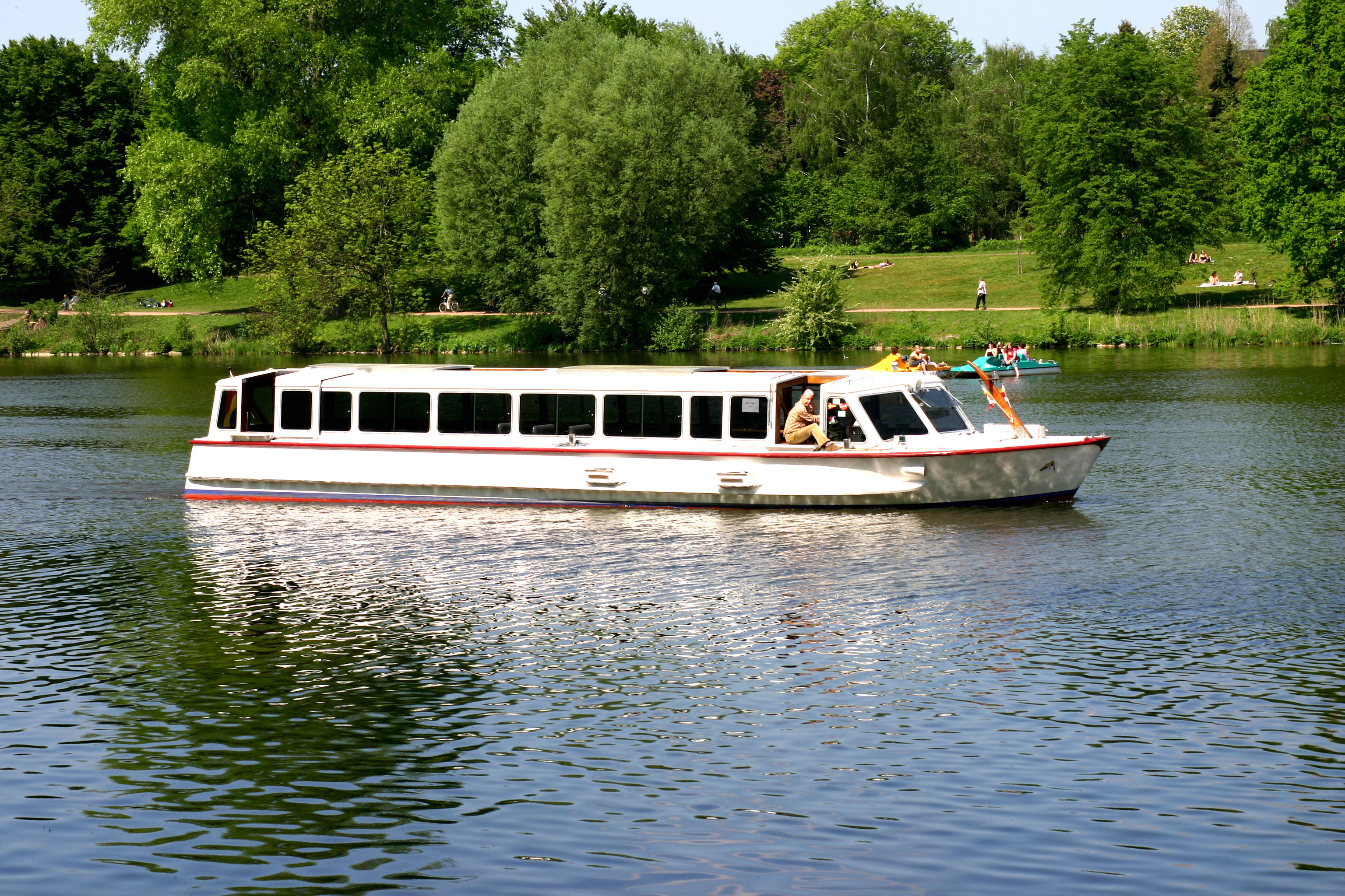 Schifffahrtslinie Professor Landois - Von der "Goldenen Brücke" fährt der Wasserbus in 30 Minuten über das Freilichtmuseum Mühlenhof zum Zoo